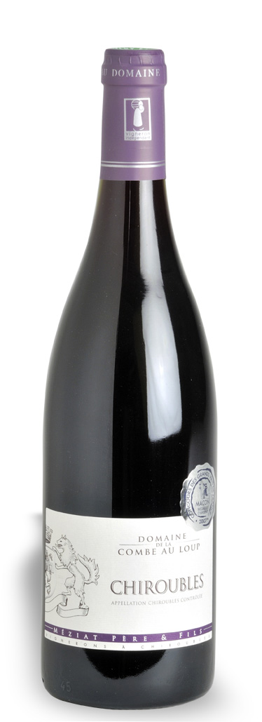 Une bouteille de vin de Chiroubles (Domaine de la Combe au Loup, Méziat Père et Fils)